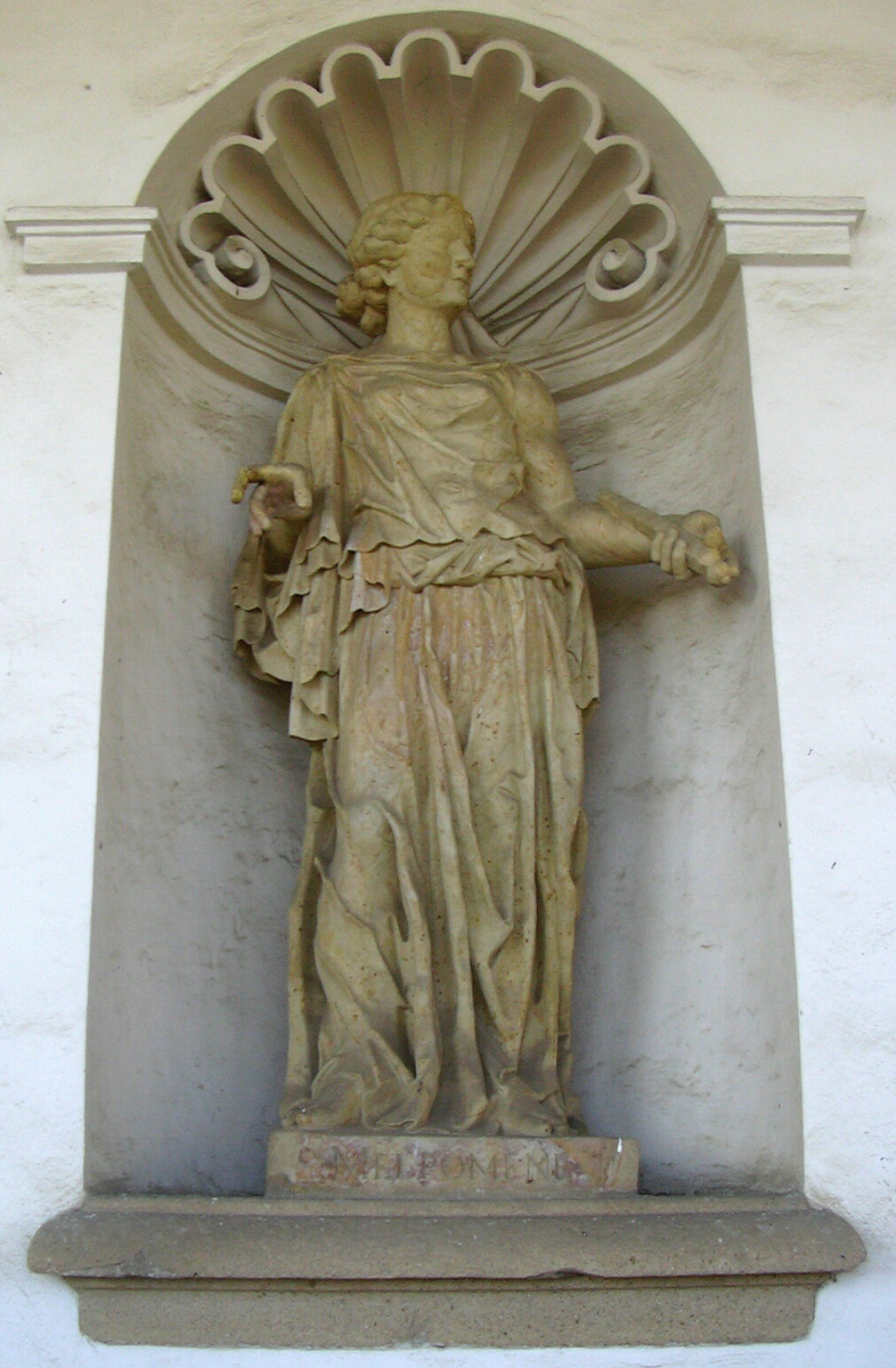 Melpomene - socha Kroměříž Květná zahrada